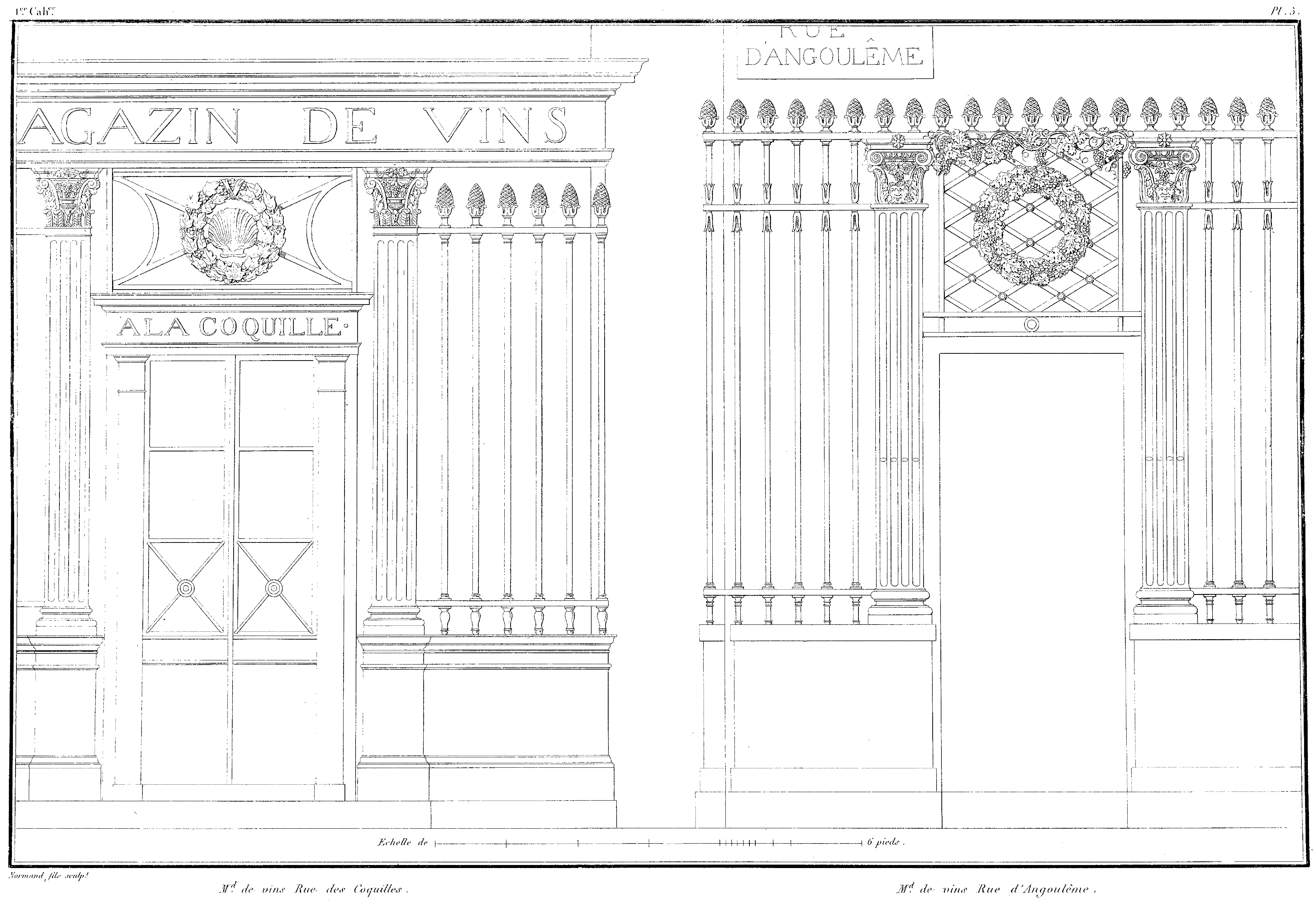 Cette jolie devanture de boutique de marchand de vins est située au coin de la rue des Coquilles [actuelle rue du Temple], ce qui lui a fait donner une coquille pour enseigne. Elle est, dans son genre, un modèle digne d’éloges ; on remarquera que les chapiteaux, ornés de vignes, et les pommes de pin qui surmontent les barreaux, ornemens en quelque sorte obligés ici, sont heureusement disposés. La proportion générale est bonne ; les portes, le soubassement et les pilastres sont bien encadrés dans le bâtiment qui leur sert de fond. La seconde devanture se voit rue d’Angoulême [actuelle rue Jean-Pierre-Timbaud]. Les motifs d’ornement sont à peu près les mêmes que dans la précédente ; mais les chapiteaux sont remarquables par la tête de Silène introduite dans leur ajustement. Dans l’une comme dans l’autre, la manière dont les barreaux sont profilés à leur pied, mérite de fixer l’attention.